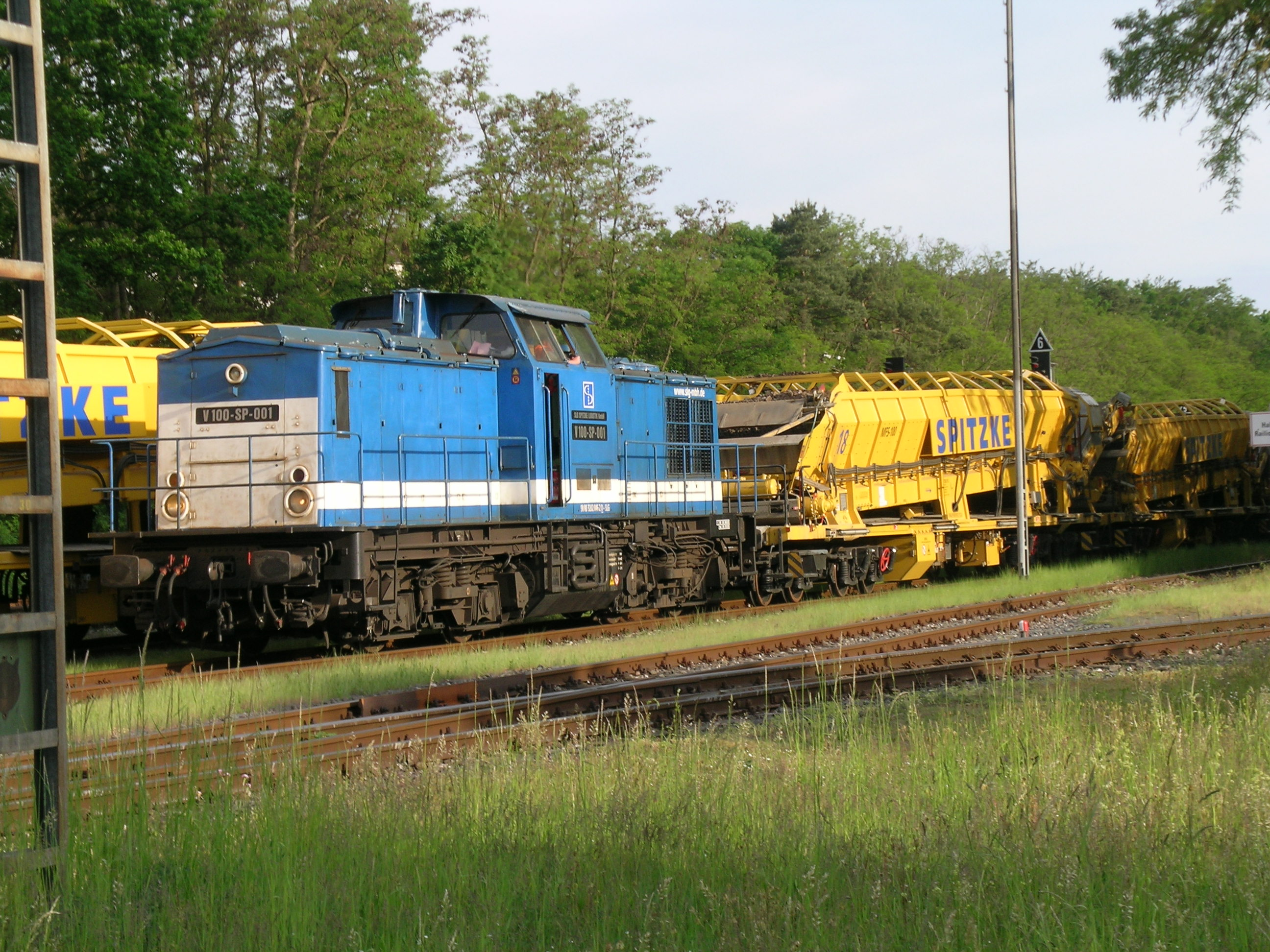 Diesellok V100 der Fa. Spitzke mit Material-Förder- und Siloeinheit MFS100 auf dem Rangiergleis in Obernburg am Main